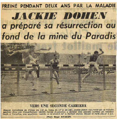 Article sur le retour de Jacques Dohen après la Malaria